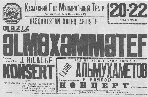 Башҡортса: Ҡаҙаҡ дәүләт музыкаль театры афишаһы